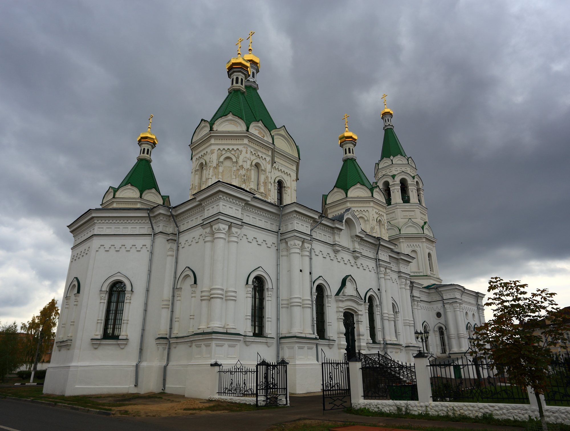 Собор Александра Невского (Москва и Московская область, Егорьевск, площадь Александра Невского, 1)